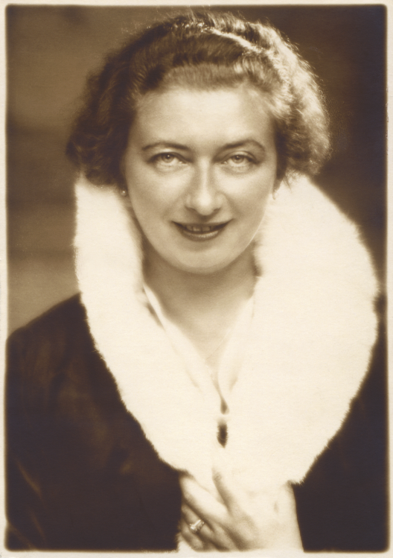 Mia Beyel, 1928, Wien